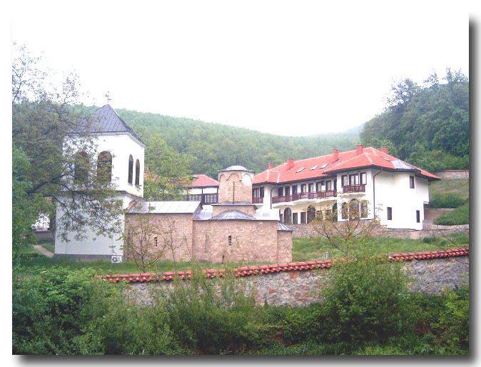 Lipovac monastery, Serbia/Monastère de Lipovac, Serbie